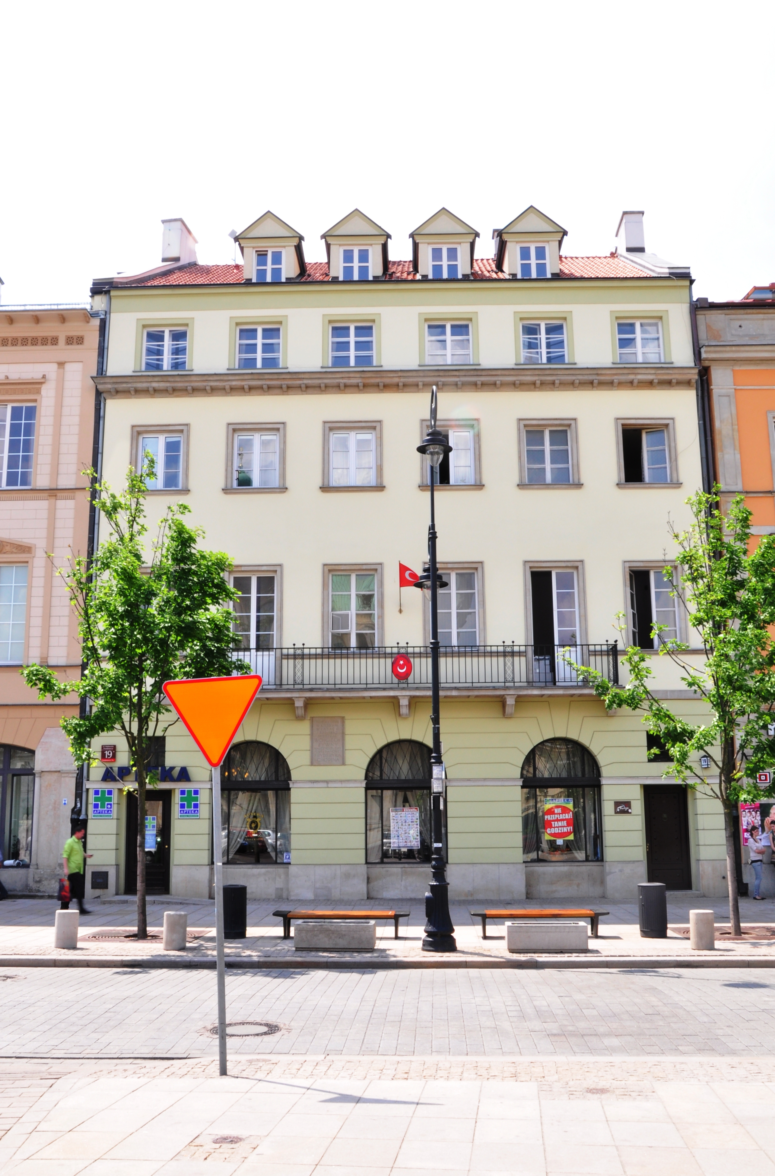 Warschau, Krakowskie Przedmieście 19.